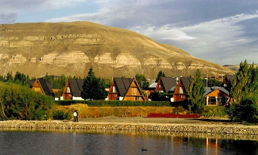 El Calafate, Santa Cruz Province, Argentina.